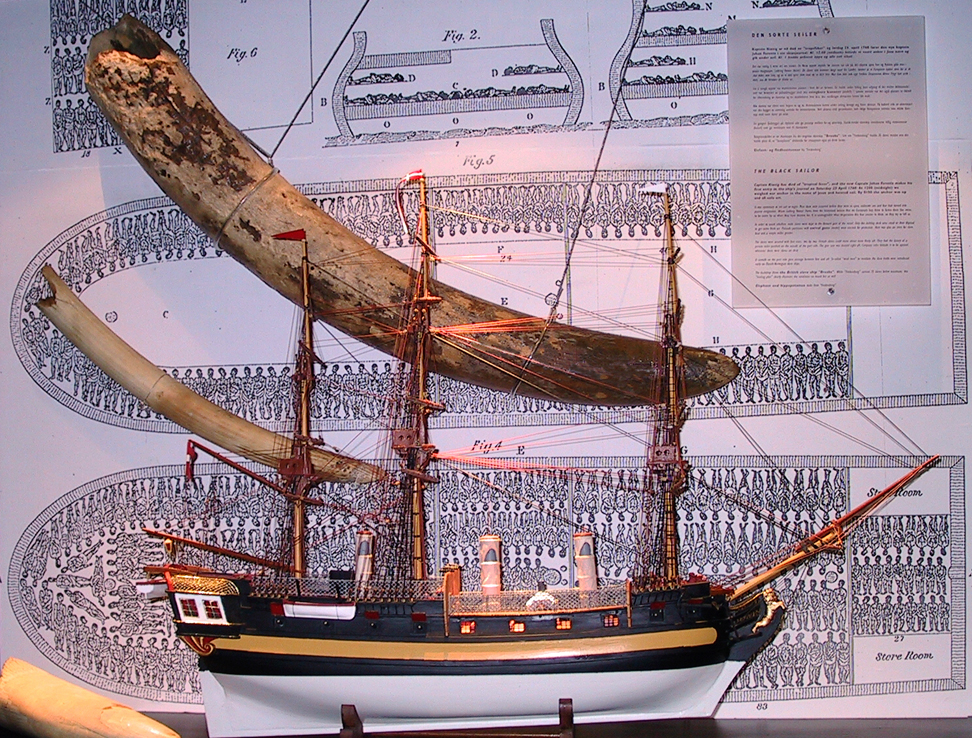 Fra Fredensborgutstillingen på Aust-Agder kulturhistoriske senter, Arendal.Modell av slaveskipet, elfenben fra vrakfunnet og tegninger av dekk fra slaveskip.